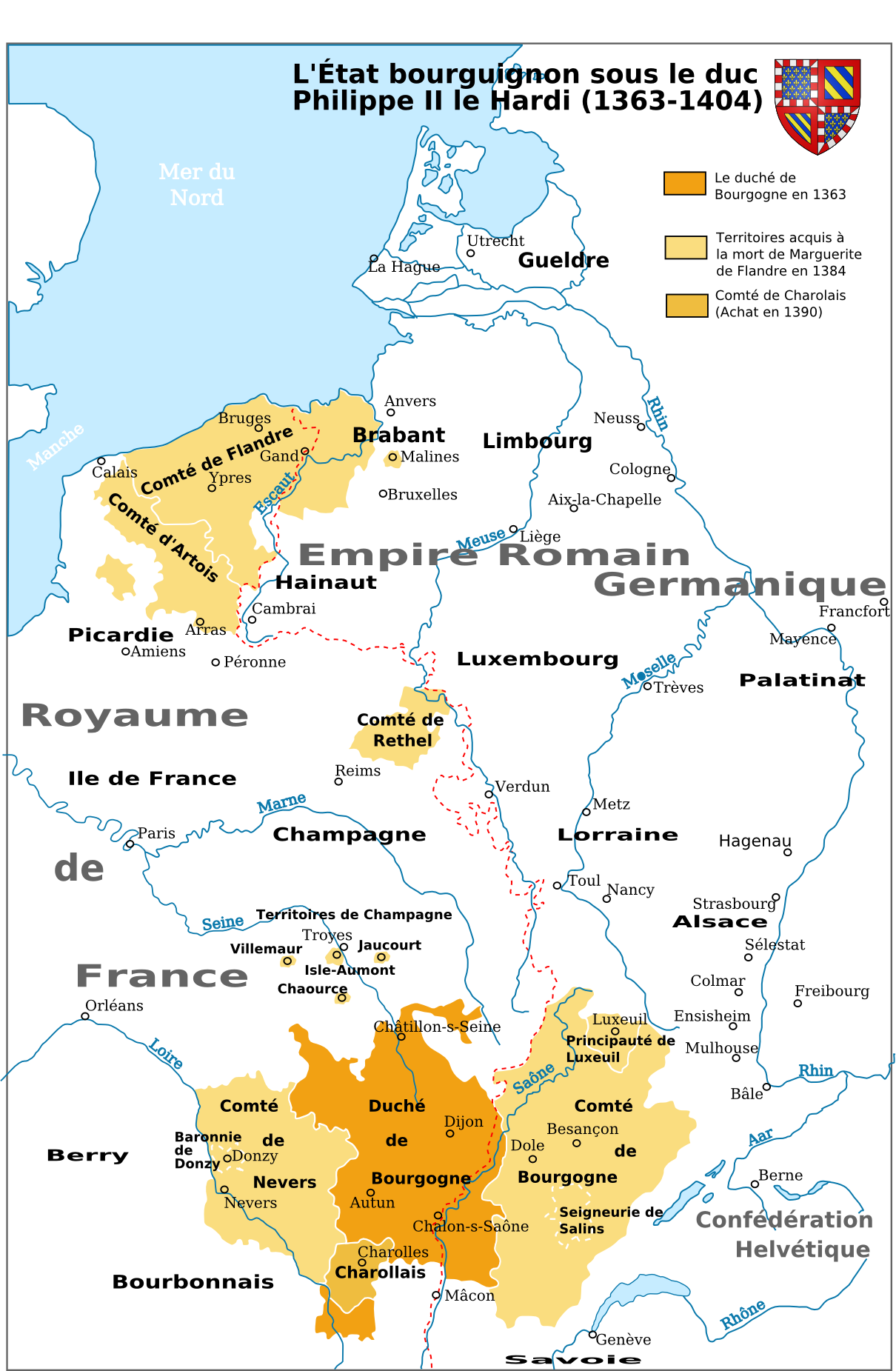 Das Herrschaftsgebiet des Hauses Burgund unter Philipp dem Kühnen zwischen 1363 und 1404